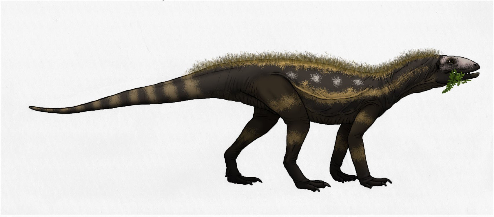 Kwansaurus williamparkeri. 2019. Credits to Jeffrey W. Martz.